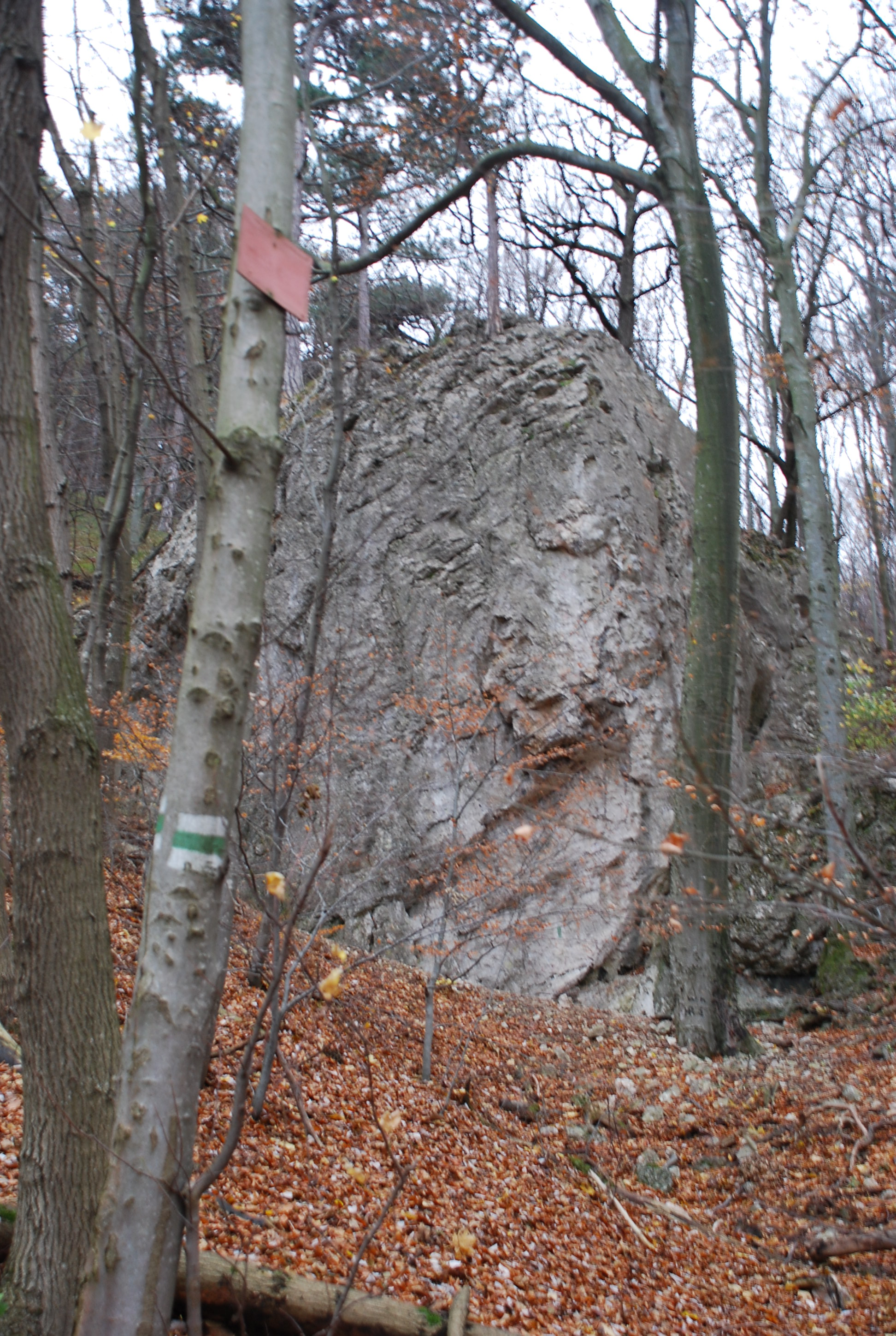 Teufelstein östlicher Block